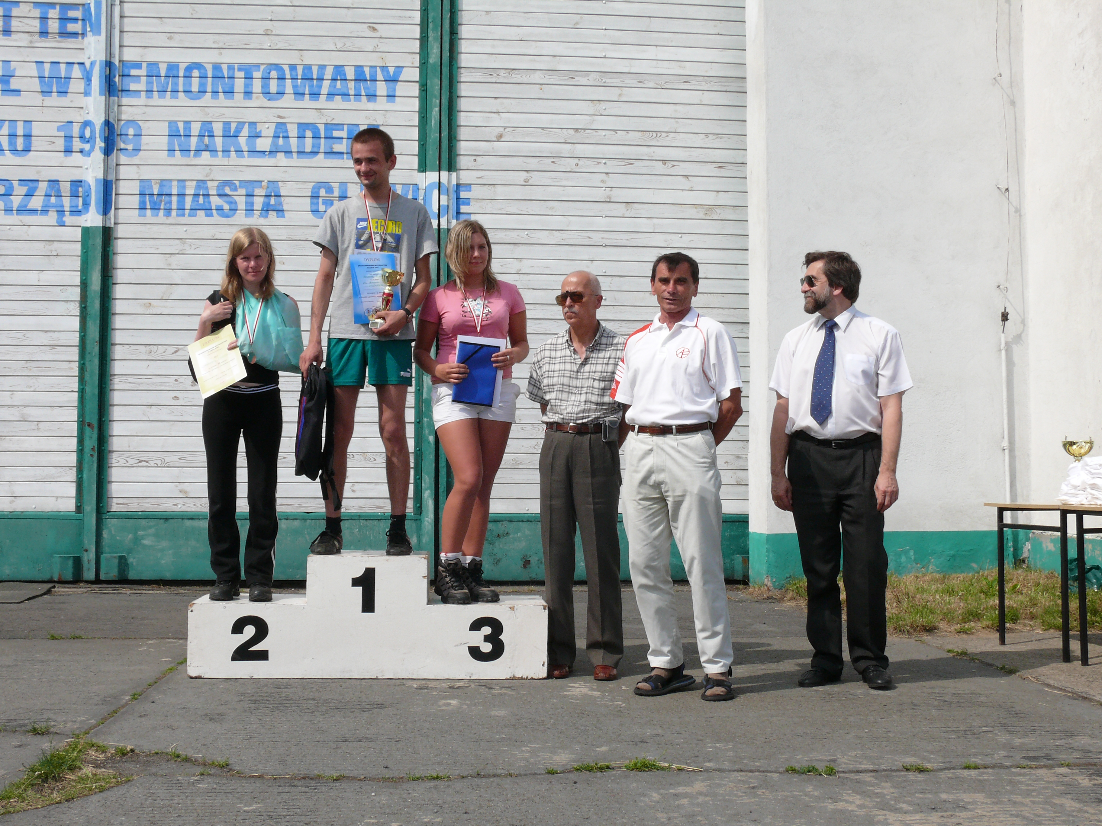 Spadochronowe Mistrzostwa Śląska 2007. Dekoracja uczestników konkurencji celność lądowania-spadochrony szkolne: I m-ce – Włodarczyk Grzegorz 14,00 m, II m-ce – Terech Katarzyna 31,00 m, III m-ce – Psiuk Katarzyna 54,00 m. Stoją od prawej: Leszek Wlazło Prezes Zarządu Aeroklubu Gliwickiego, Jan Isielenis i Marian Brytan — Sekcja Spadochronowa Aeroklubu Gliwickiego